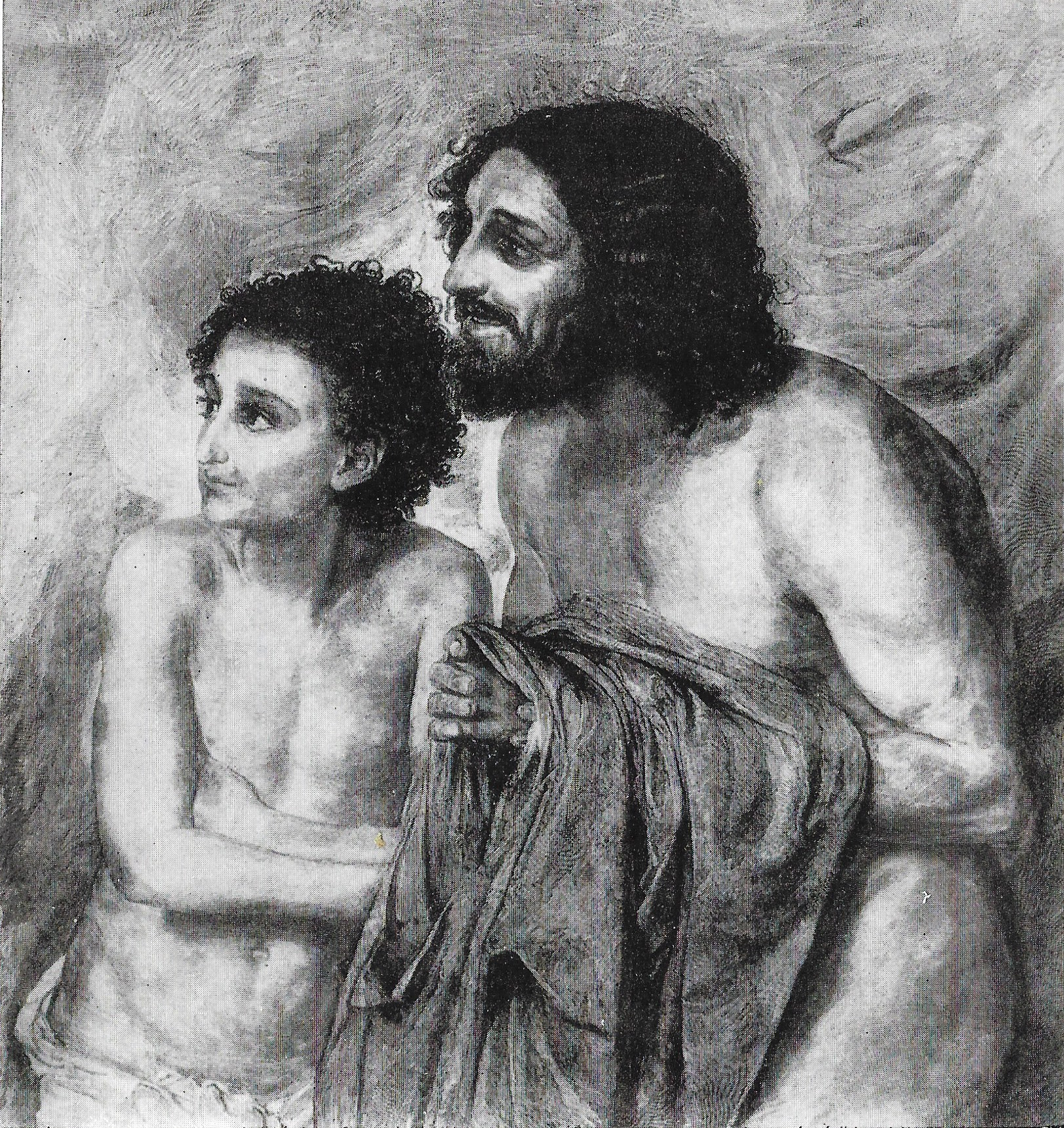 Xylographie de Vassili Mate "Esclaves" d'après Ivanov années 1870